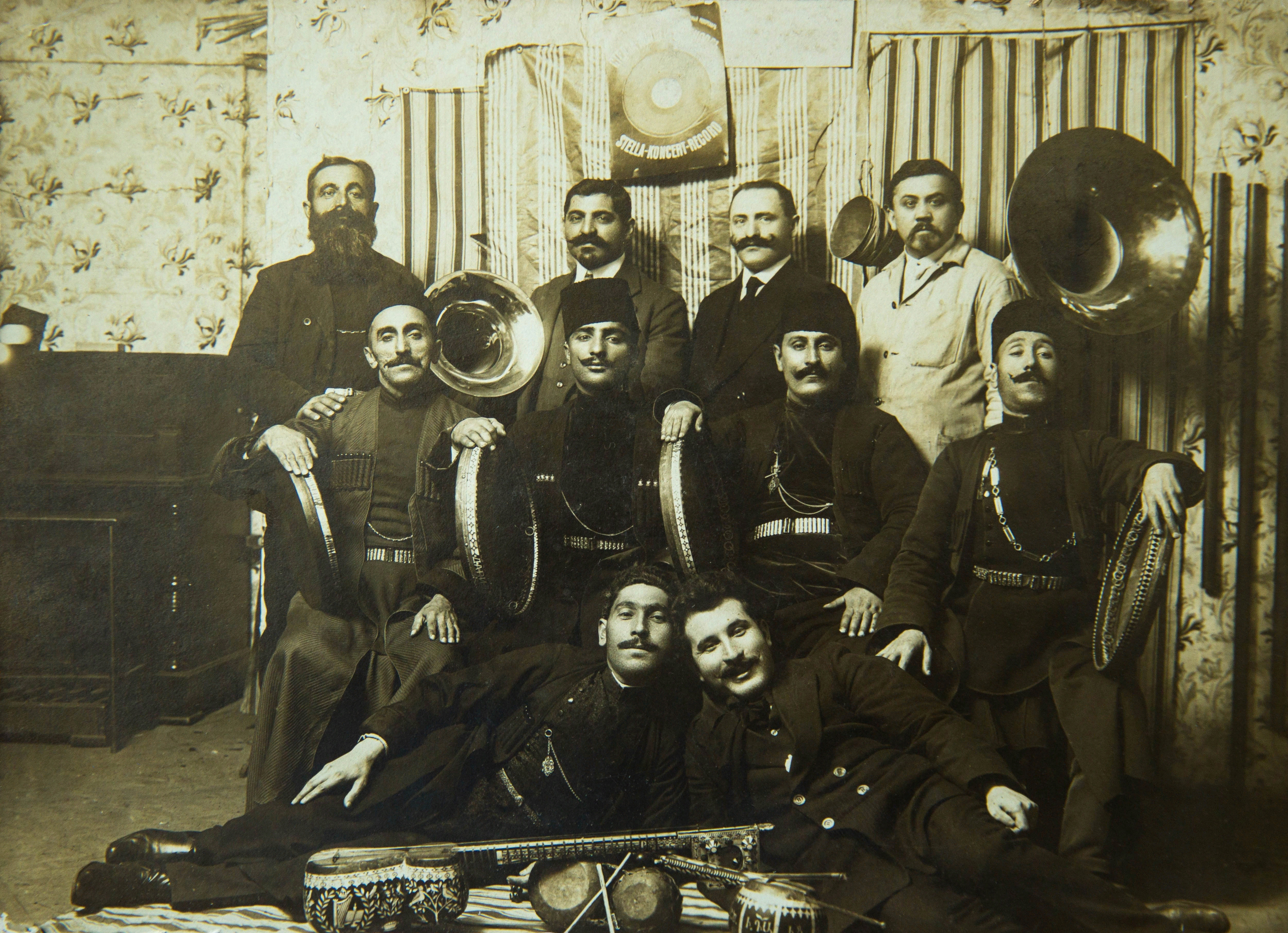 Азербайджанские музыканты после записи концертов на студии фирмы "Спорт Рекорд" в Вашаве в 1912 году. Сидят (слева направо):Джаббар Каръягдыоглы, Давид Сафияров, Мешади Мухаммед Фарзалиев, Кечачи оглы Мухаммед; внизу:Гурбан Пиримов и Саша Оганезашвили; стоят: хозяева фирмы